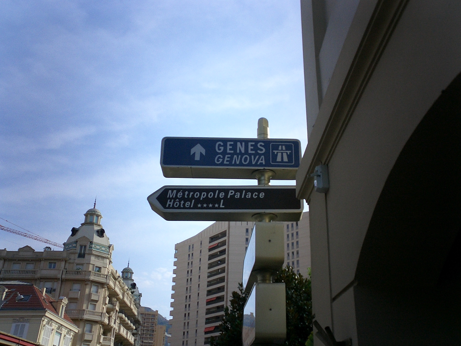 Métropole Palace Hôtel - monaco